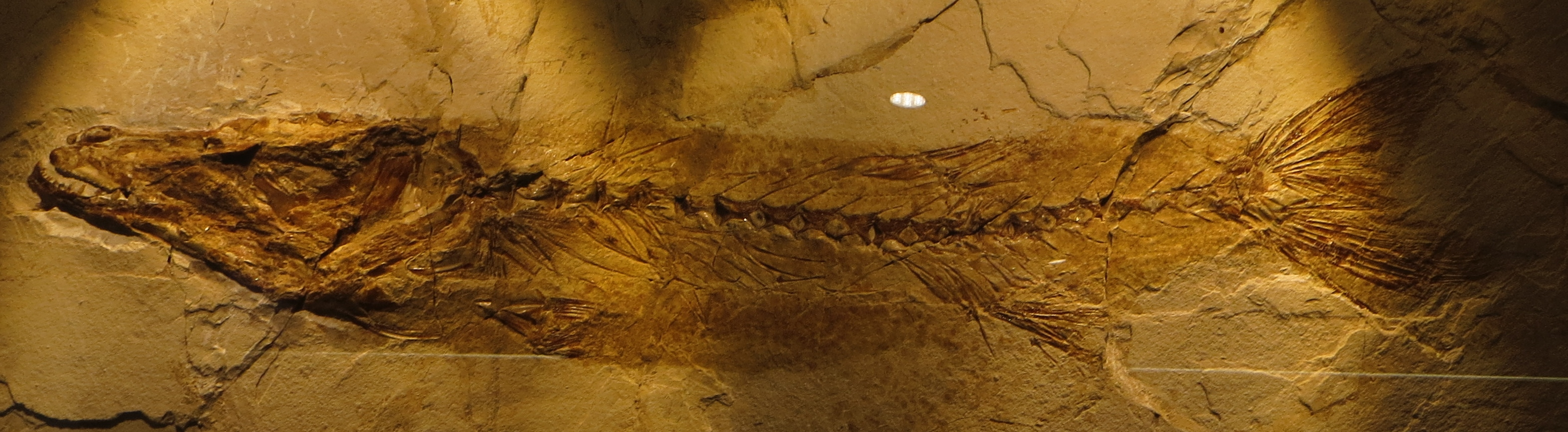 Fossil of Sphyraena- Museo dei Fossili di Bolca